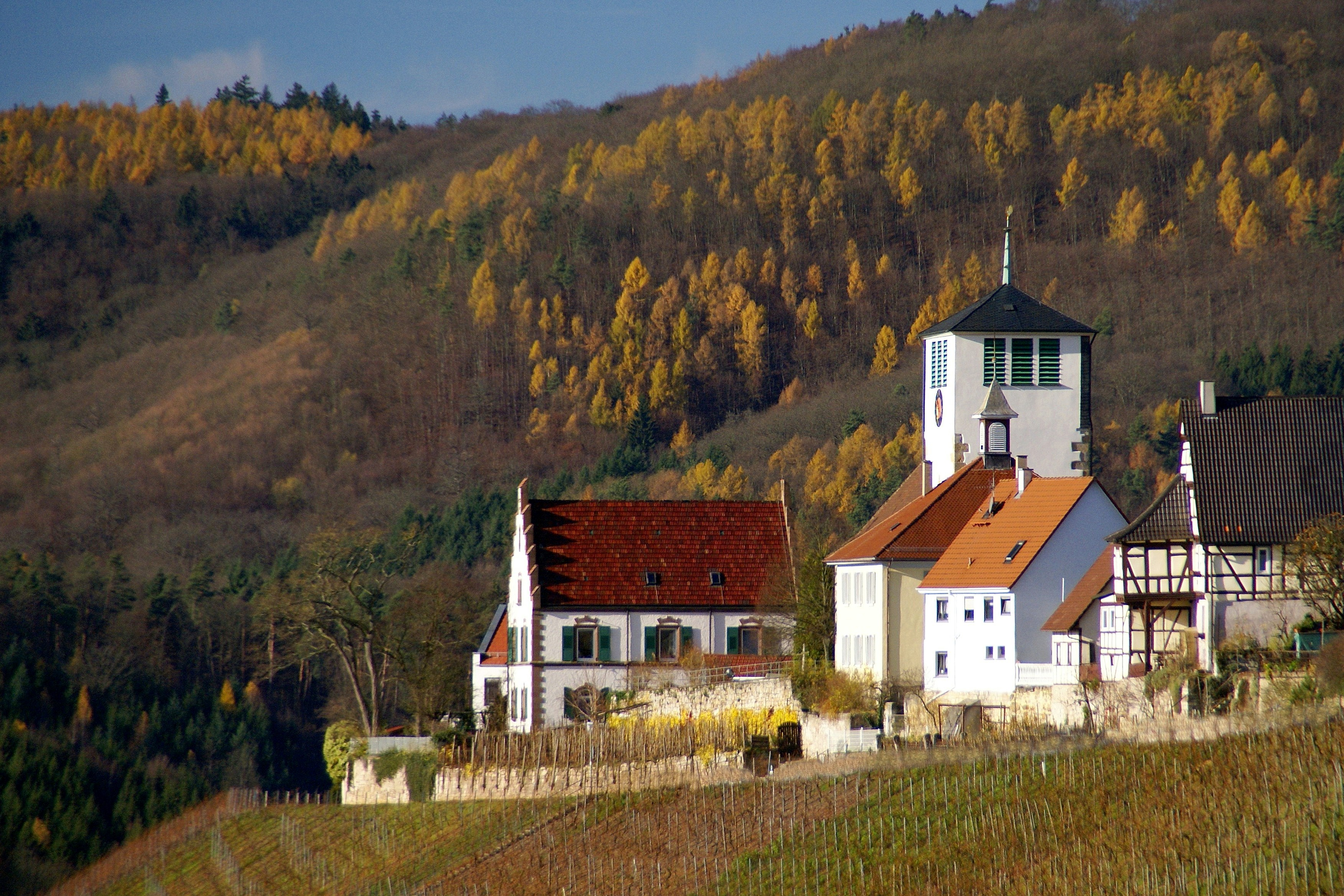 Hohenhaslach 11/2010. Blick am Südrand des Ortes entlang nach Westen auf den Verrenberg.